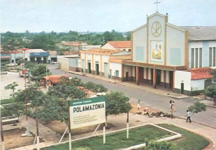 Praça de Fátima ainda em construção, com a verba do POLAMAZÔNIA